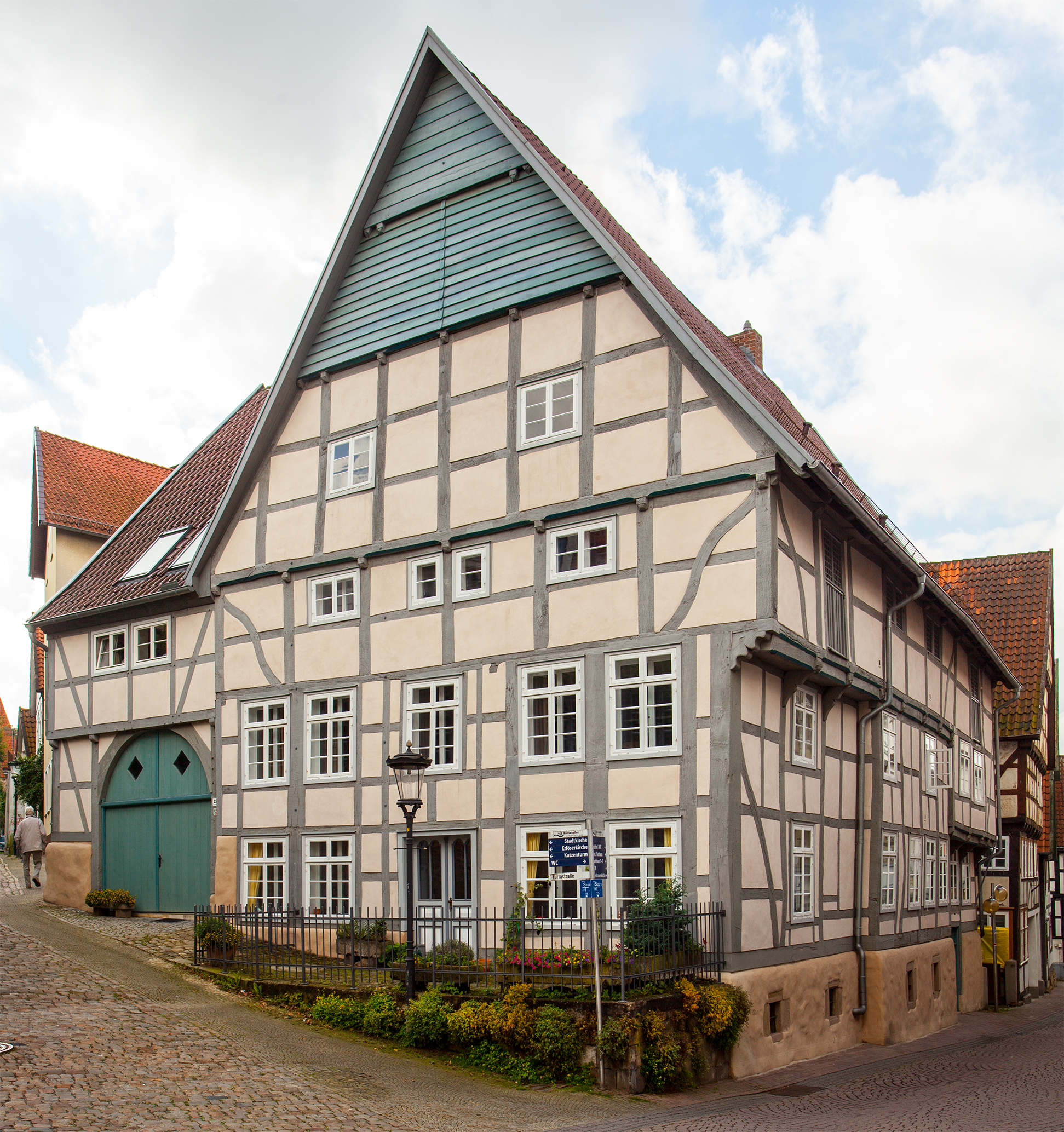 Bad Salzuflen, Turmstr. 23This is a photograph of an architectural monument.